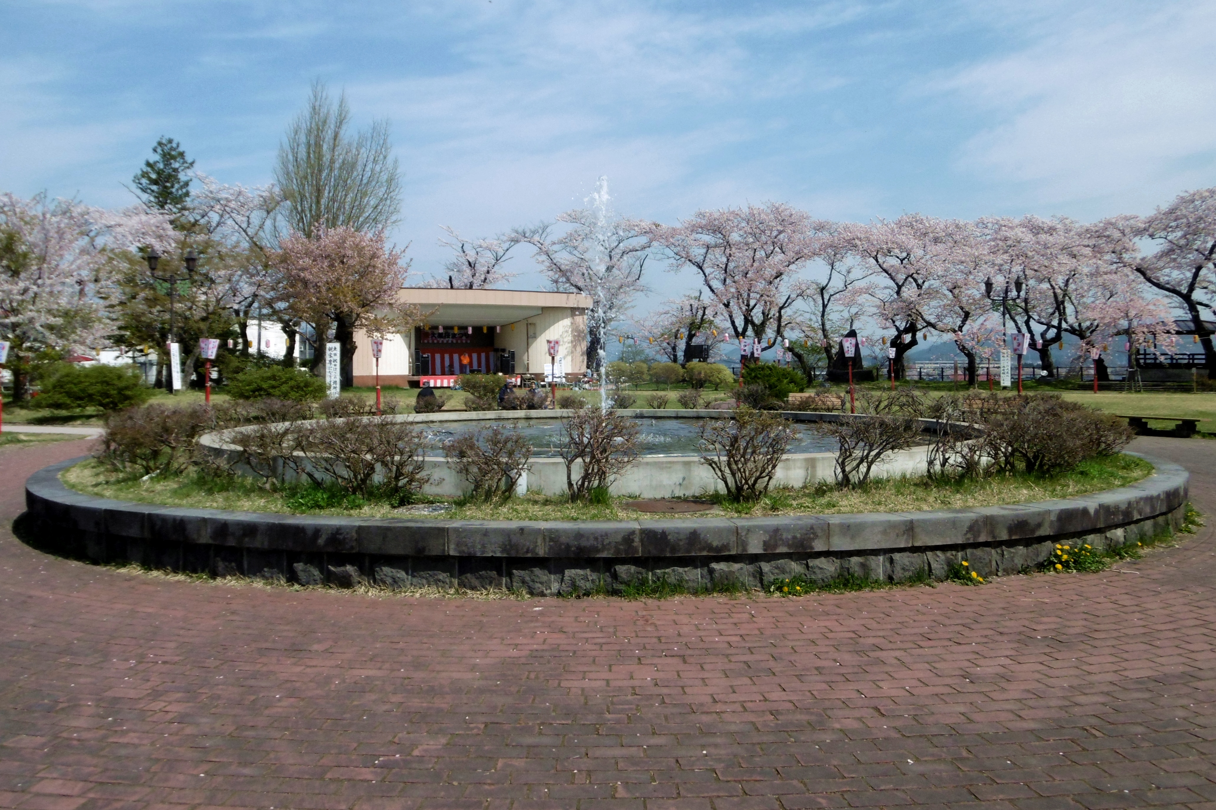 大館城の城跡にある公園 「桂城公園」